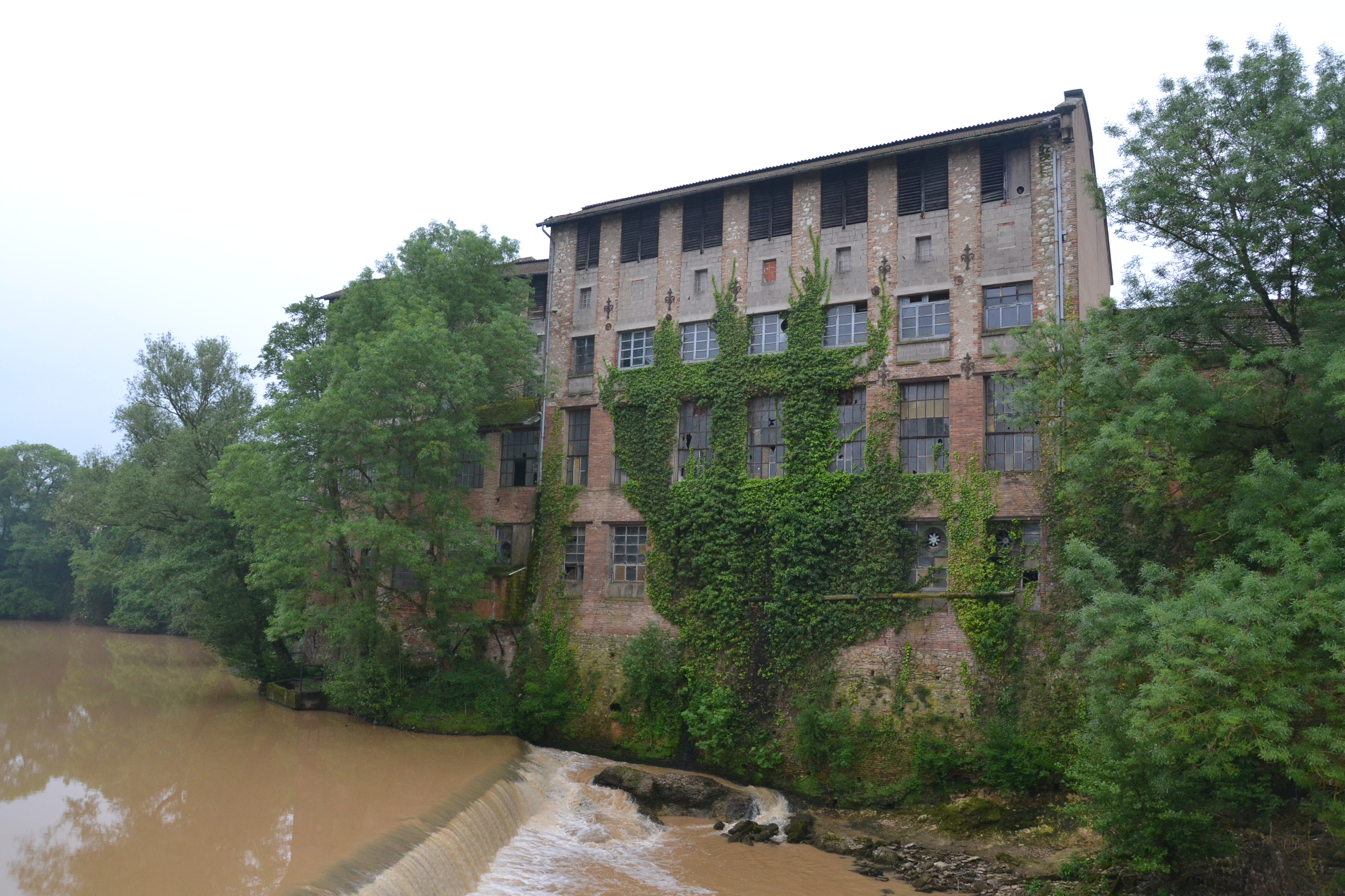 Ancienne mégisserie, Graulhet (Tarn, France).